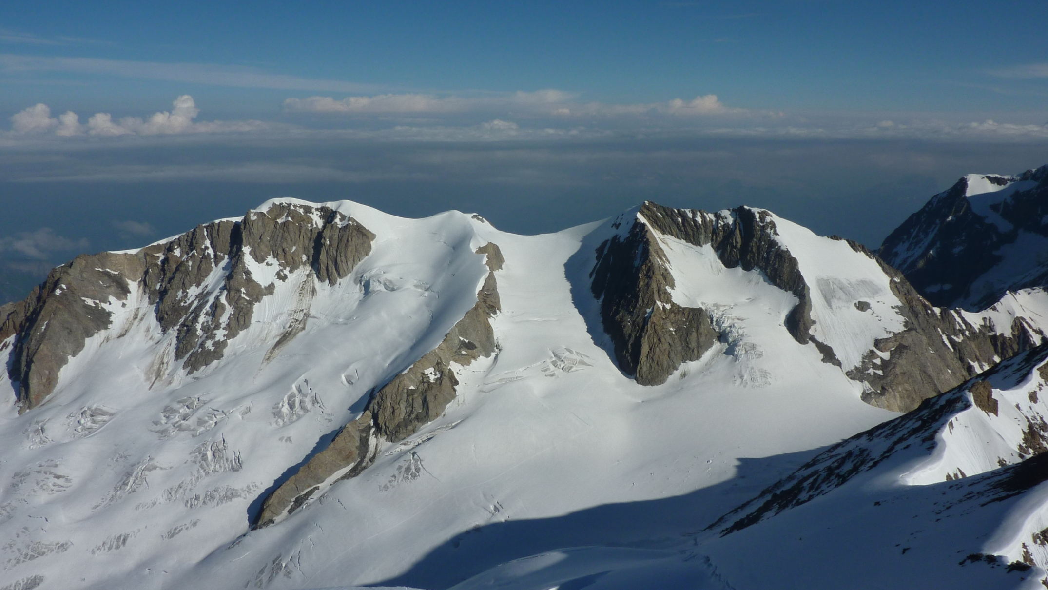 Vue sur les Dômes de Miage depuis le Sommet de l'arête Nord de Tré la Tête